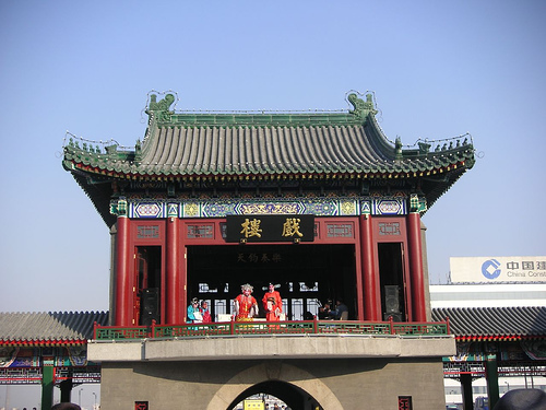 天津戏楼